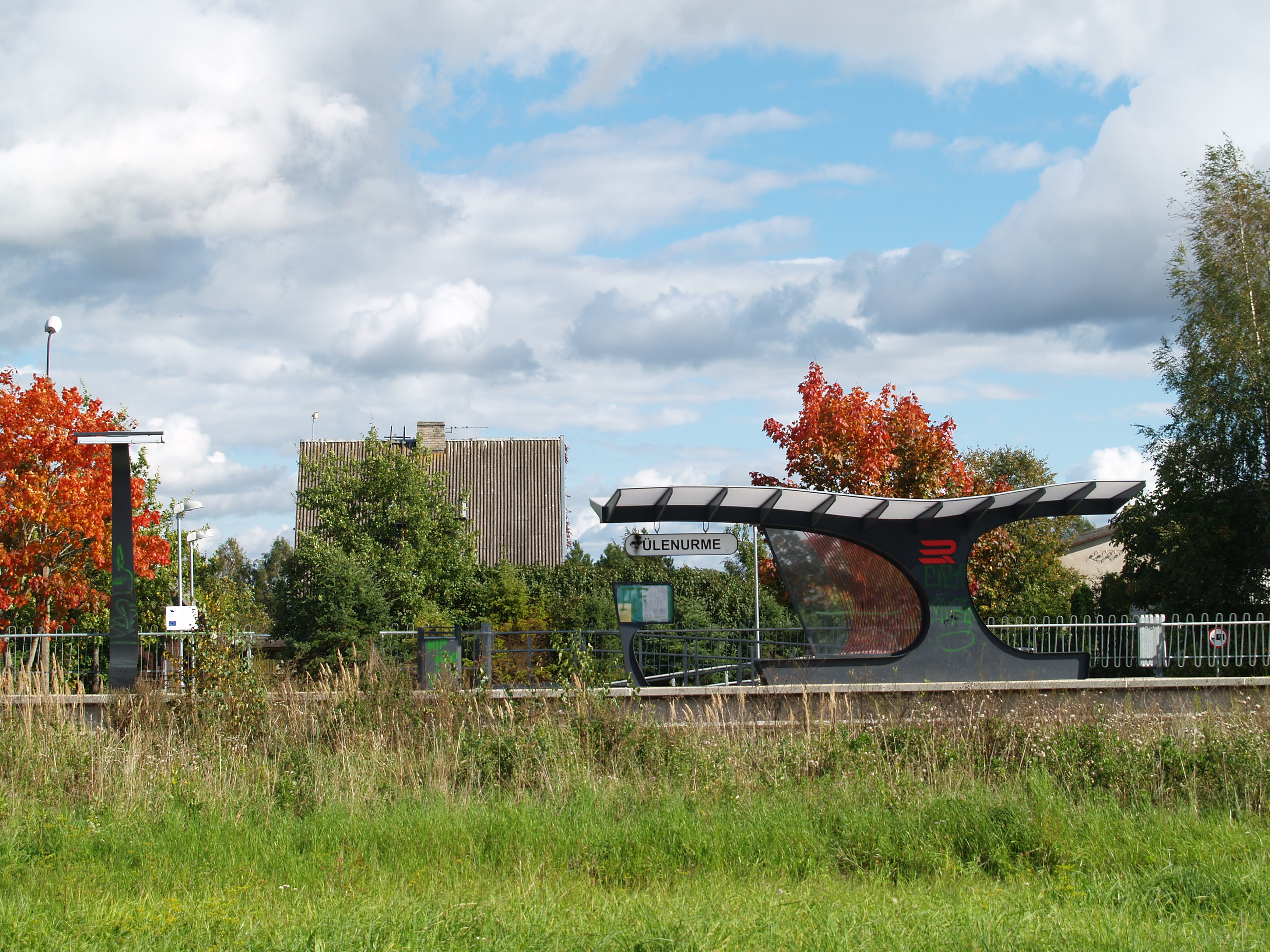 Ülenurme raudteepeatus